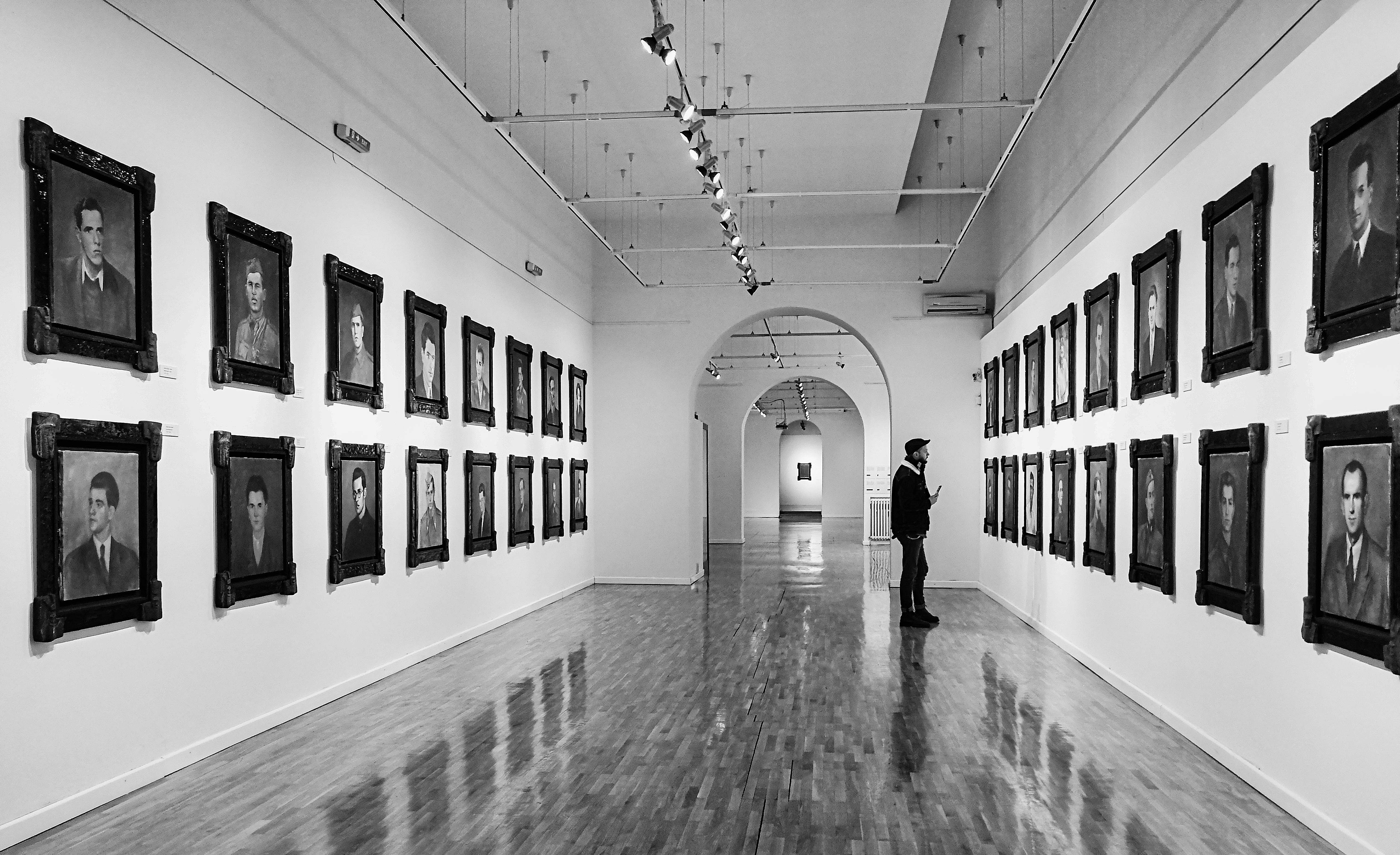 Interijer Muzeja savremenih umjetnosti Republike Srpske